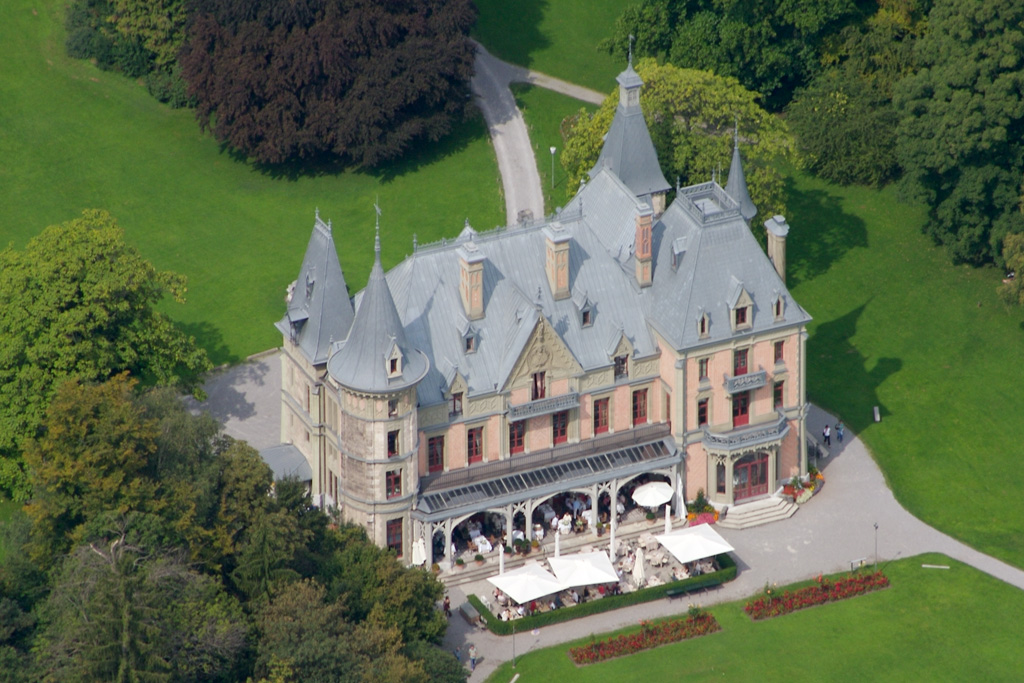 Schloss Schadau, Thun, Schweiz